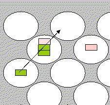 posición del juego del Lasca en la que una columna ataca a otra